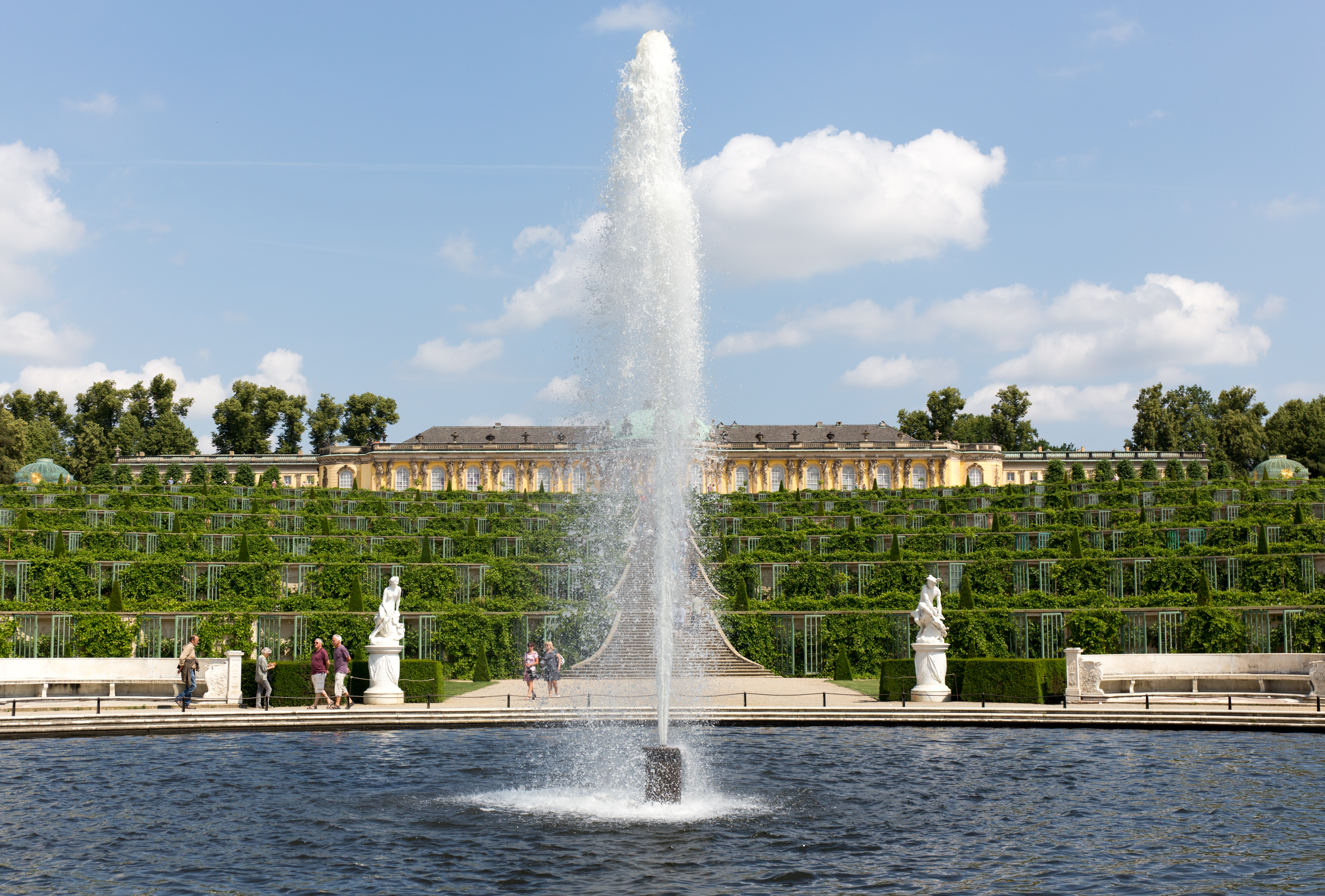 KulTour Parkanlage Sanssouci Schloss